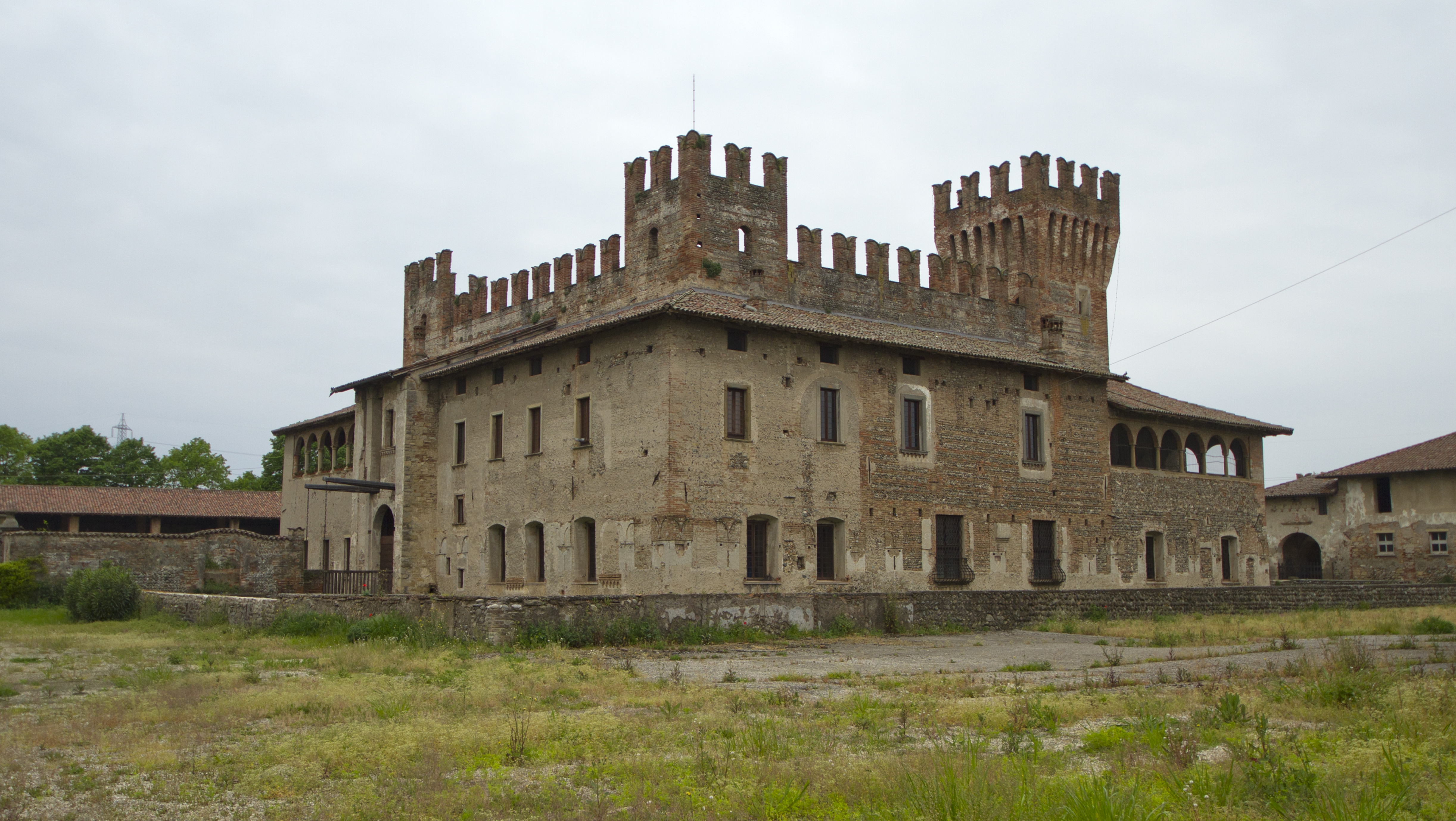 24050 Malpaga BG, Italy